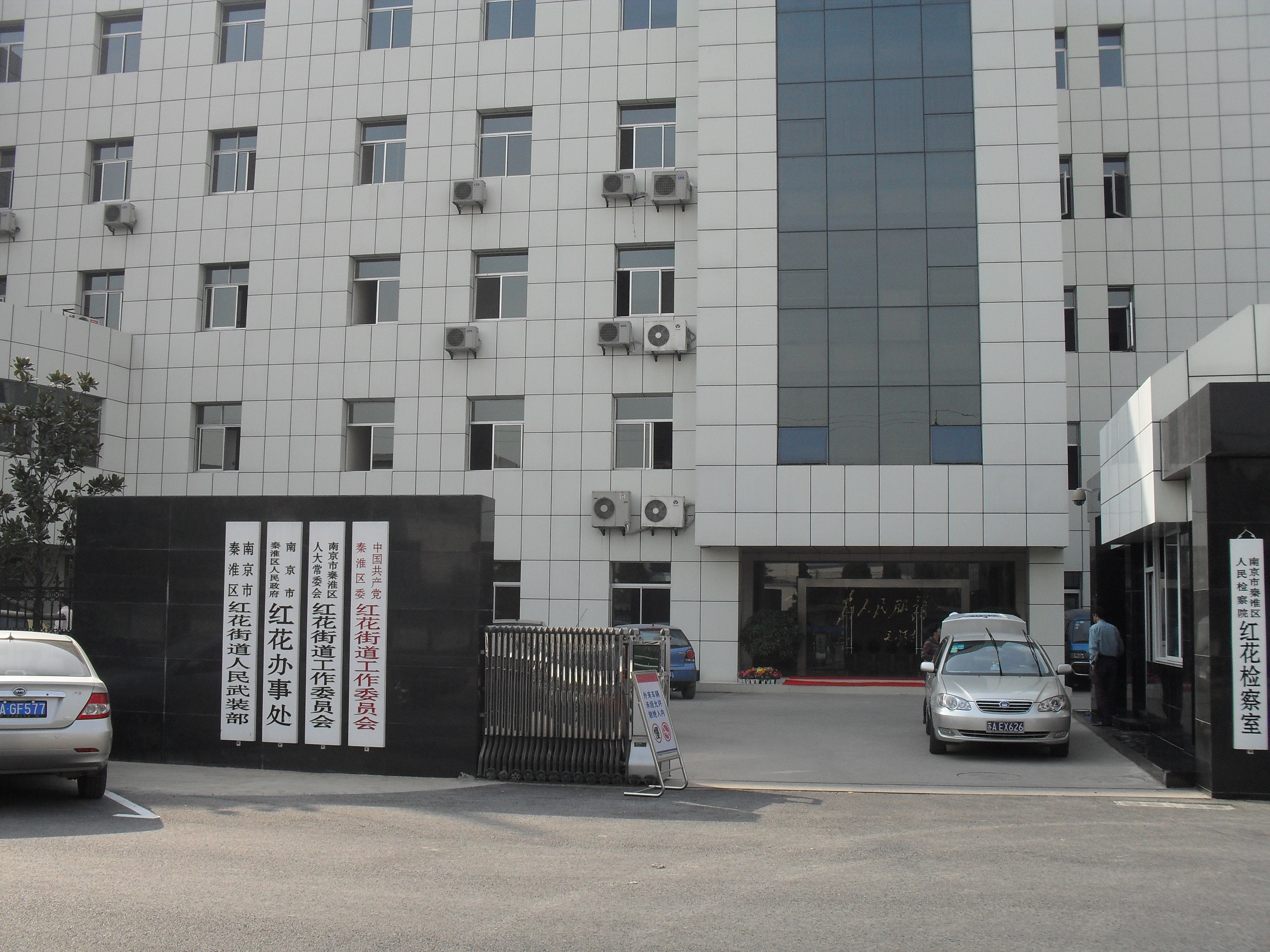 南京市秦淮区红花街道办事处